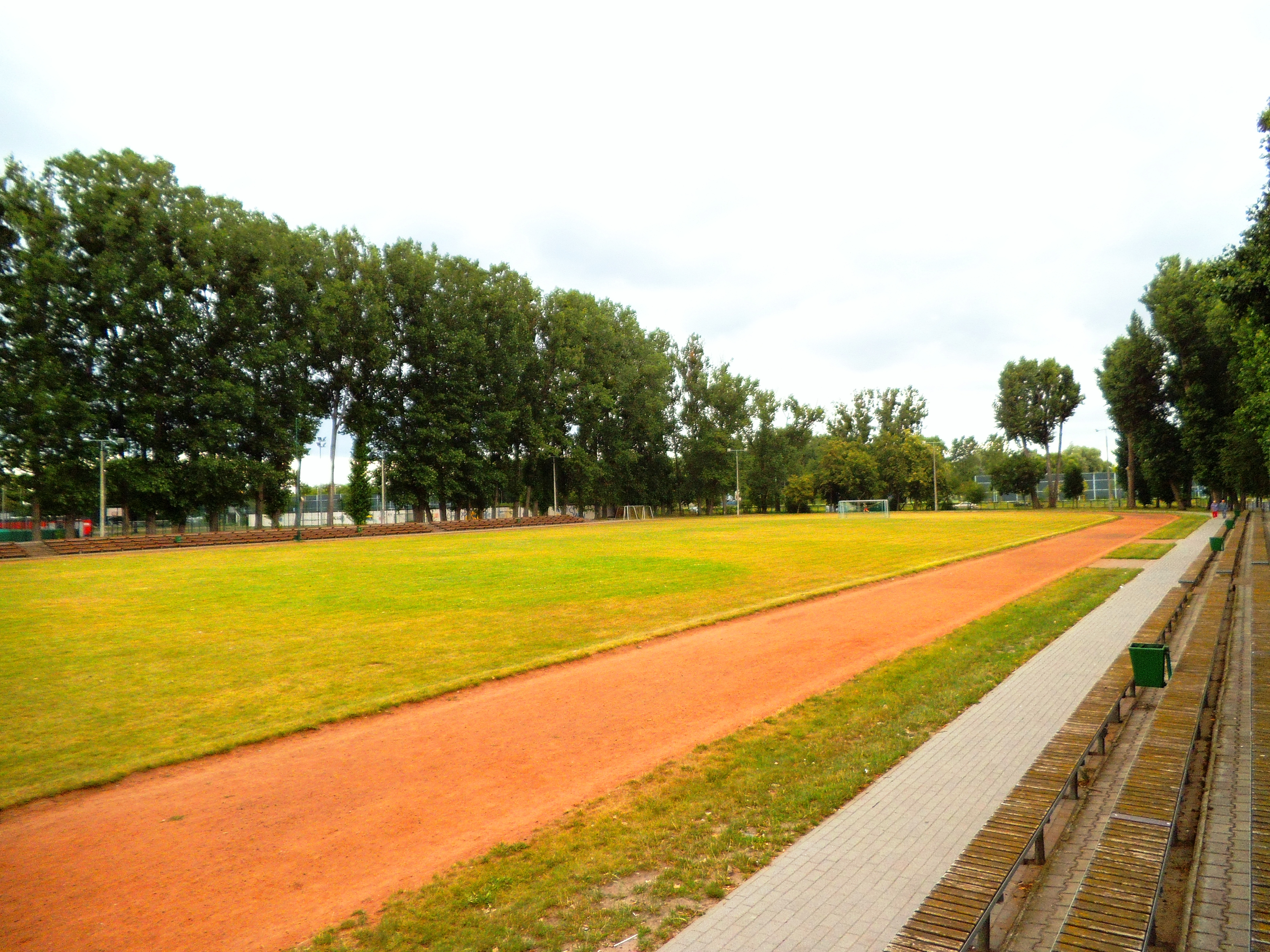 Ośrodek Sportowy im. Teodora Długokińskiego w Toruniu